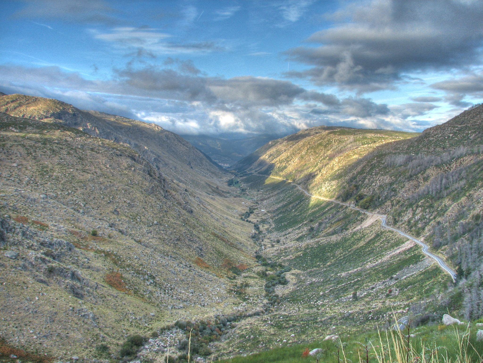 Zêzere glacial valley 01 HDR